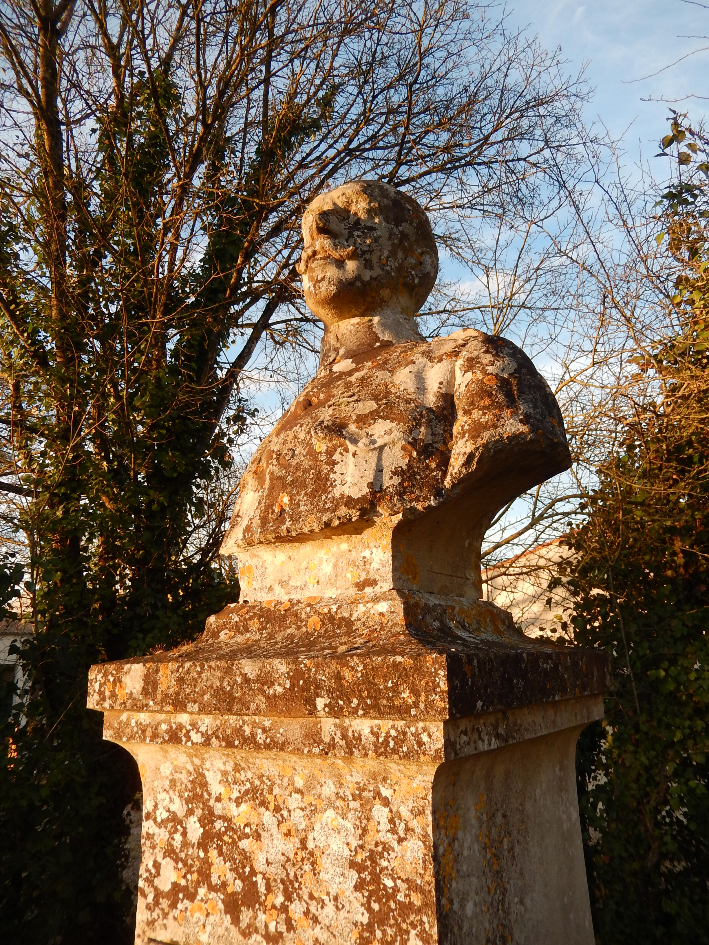 Ce buste, situé à Crazannes (Charente-Maritime, France) représente le Docteur Jean BRON, médecin-major de 1re classe.